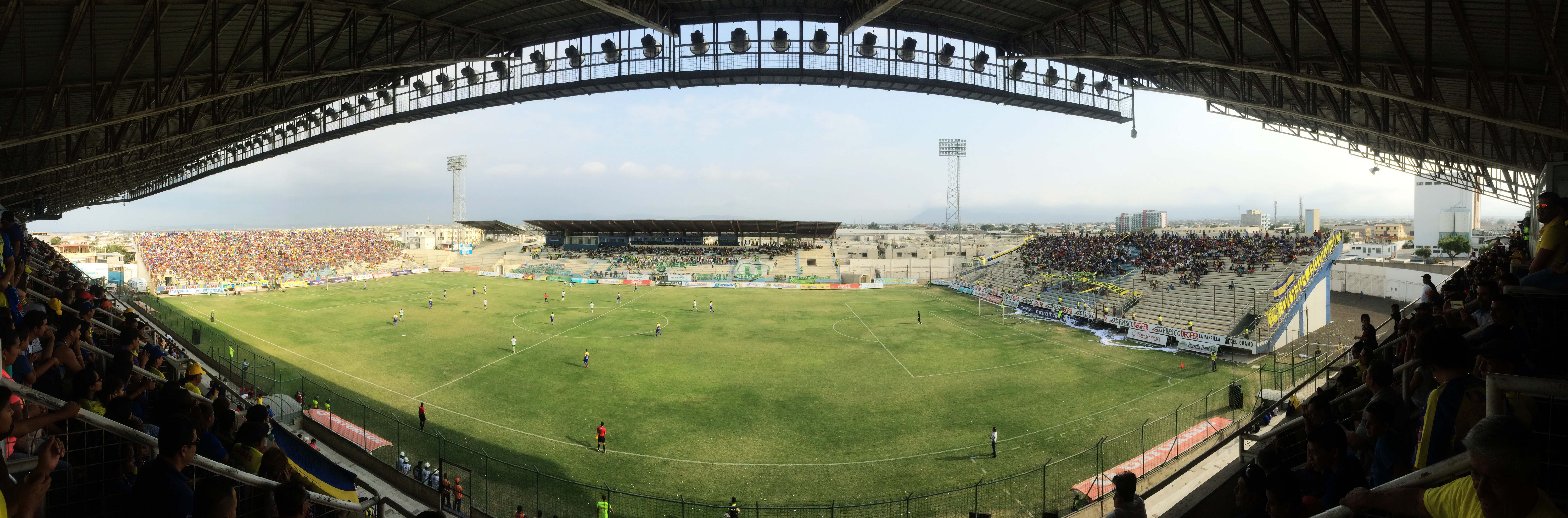 Panorámica del Estadio Jocay de Manta, en un encuentro de Delfín Sporting Club